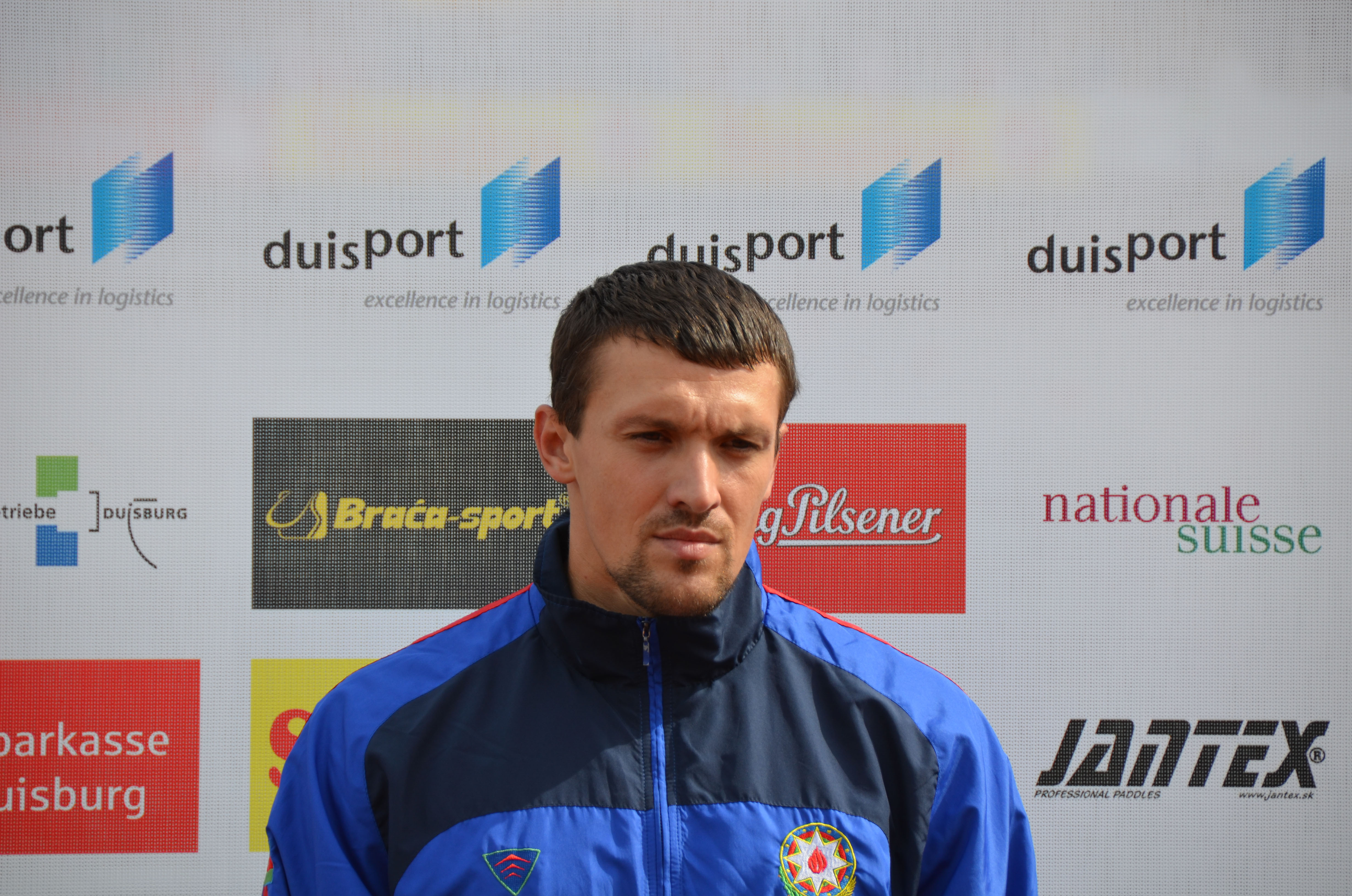 2013 ICF Canoe Sprint World Championships in Duisburg - Alle Ergebnisse/Teilnehmer unter: Gewinner: AZE - AZERBAIJAN DEMYANENKO, Valentin RUS - RUSSIA SHTYL, Ivan ESP - SPAIN BENAVIDES LOPEZ DE AYALA, Alfonso